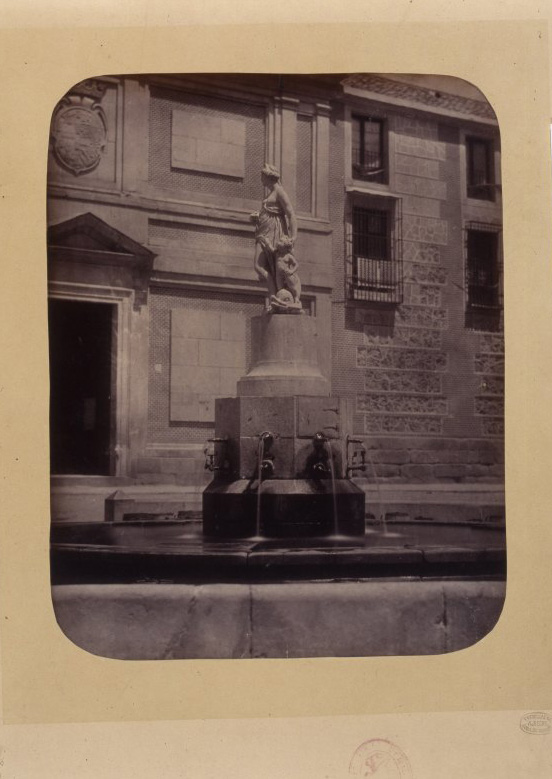 Fuente La Mariblanca en Plazuela Descalzas. Obra en 1864 del fotógrafo toledano Alfonso Begué, muerto el 31 de octubre de 1865. Cartulina sepia. Albúmina. 43 x 32 cm. Fotografía contenida en un álbum procedente del Archivo de Villa y trasladado al Museo de Historia en 1983.